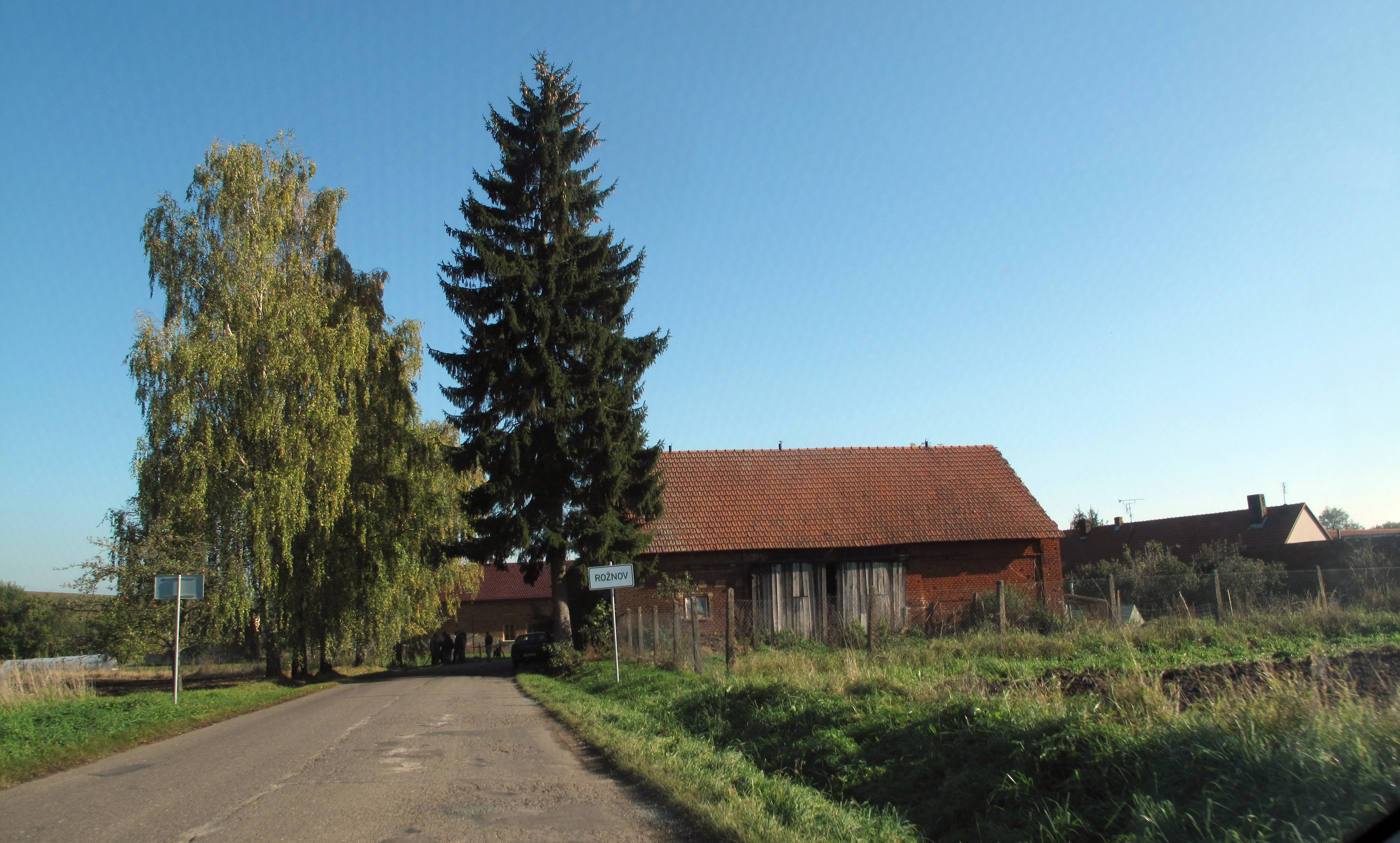 Česky: Rožnov